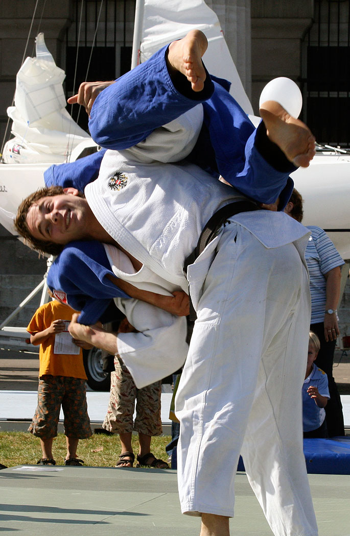 Peter Scharinger (weiß) und Max Schirnhofer am Tag des Sports 2009 auf dem Heldenplatz in Wien